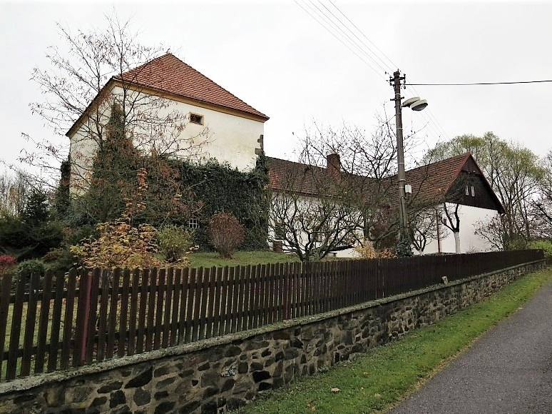 Původně středověká tvrz Holanova Turyně v Plešišti u Krásné Hory, okres Příbram